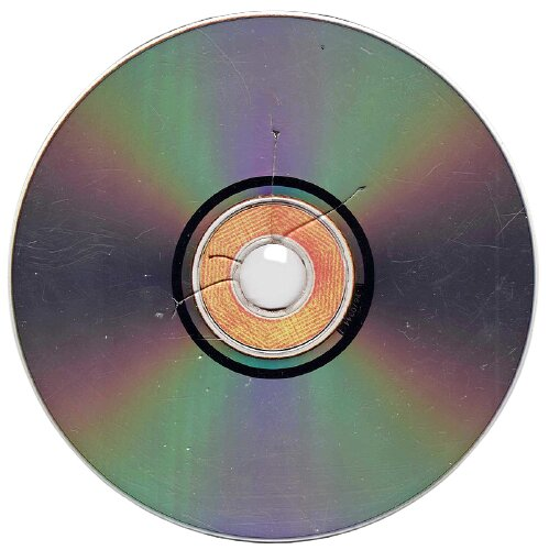 Трещины компакт-диска, приведшие его в полную негодность. Возникли в результате разбортовки